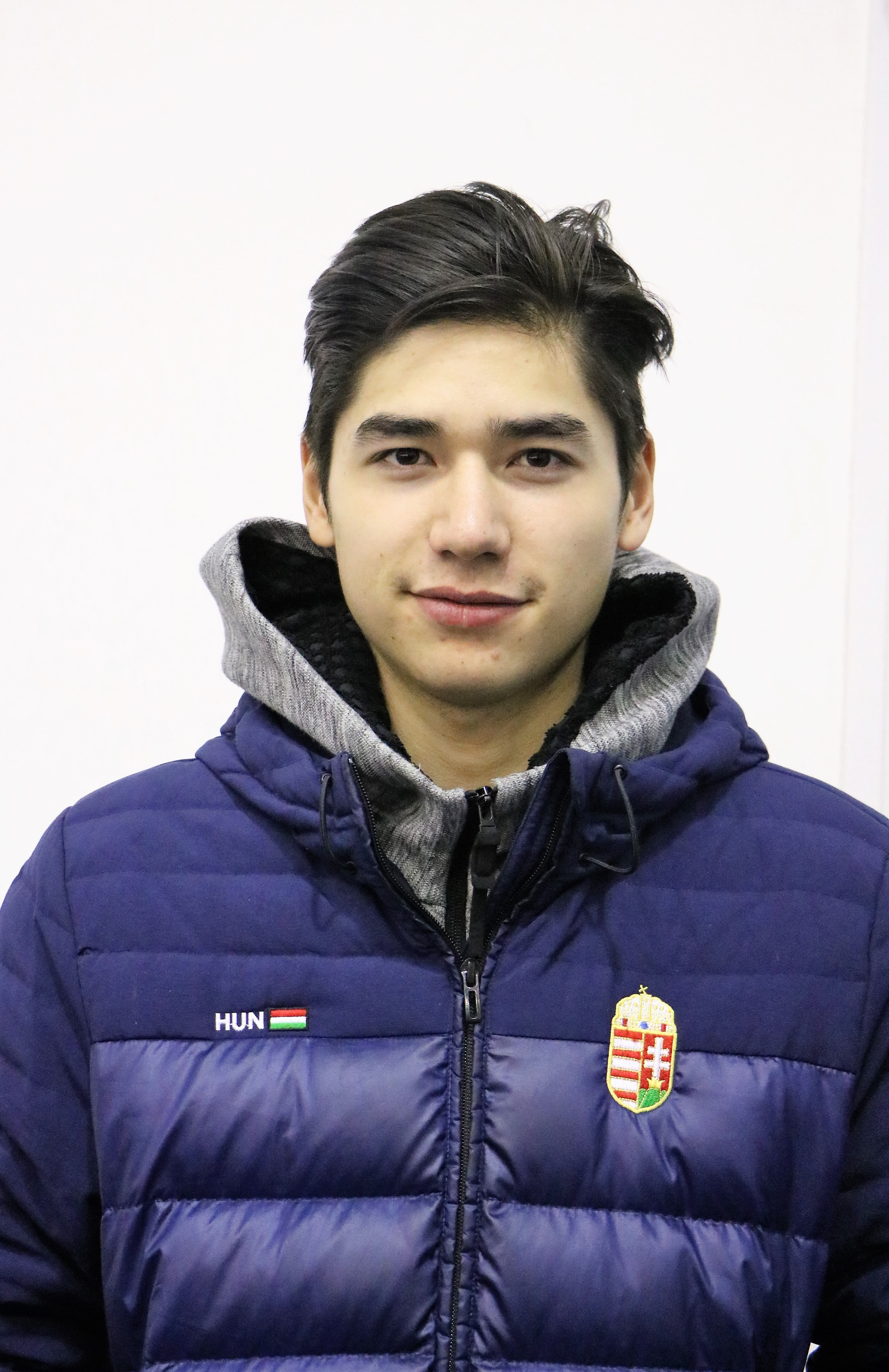 Liu Shaoang, kínaiul Liu Sao-ang (刘少昂), (Budapest, 1998. március 13. –) félig kínai származású magyar rövidpályás gyorskorcsolyázó. Válogatott sportoló, olimpiai bajnok.